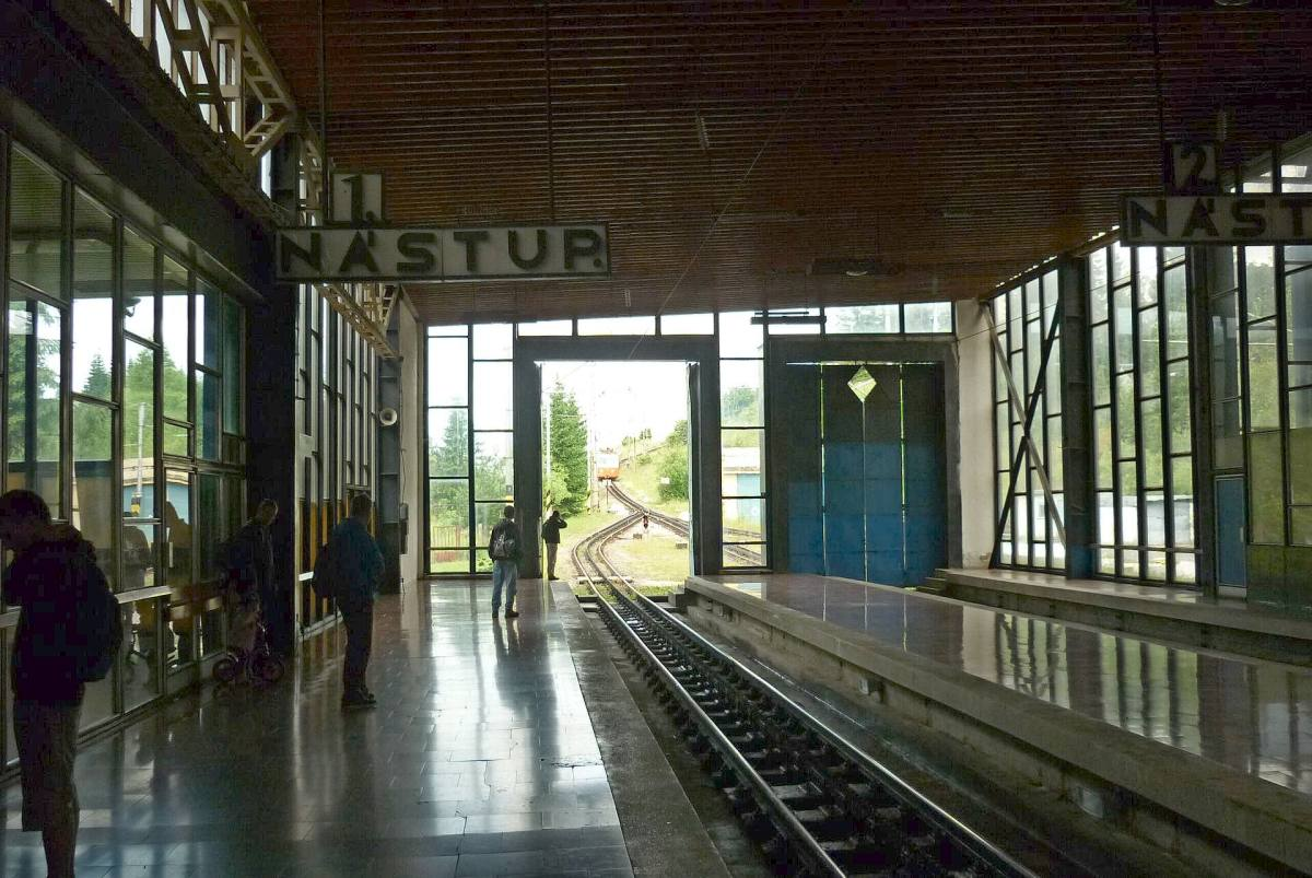 Vlakové nádraží ve Štrbě